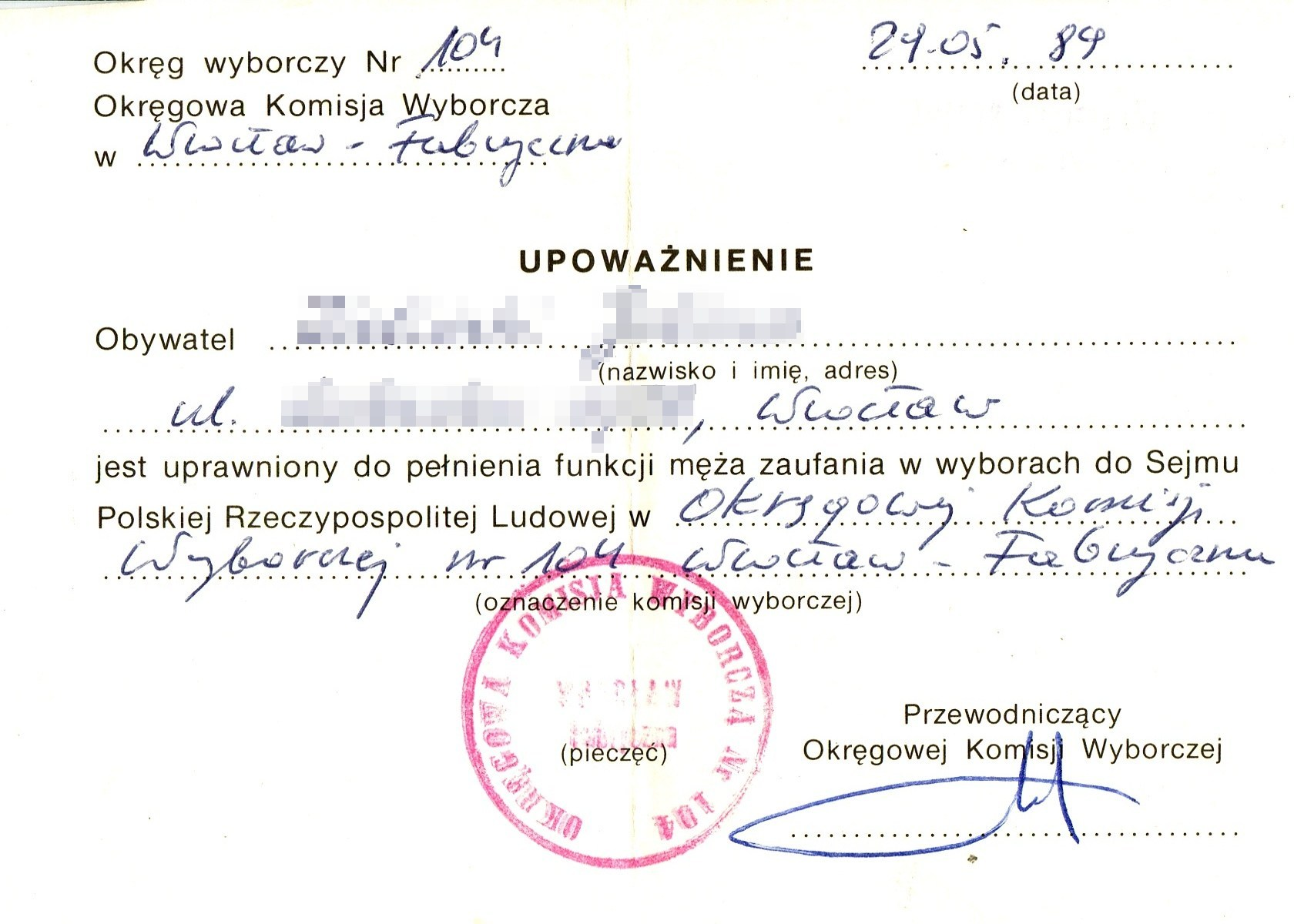 upoważnienie męża zaufania w wyborach parlamentarnych 4 czerwca 1989